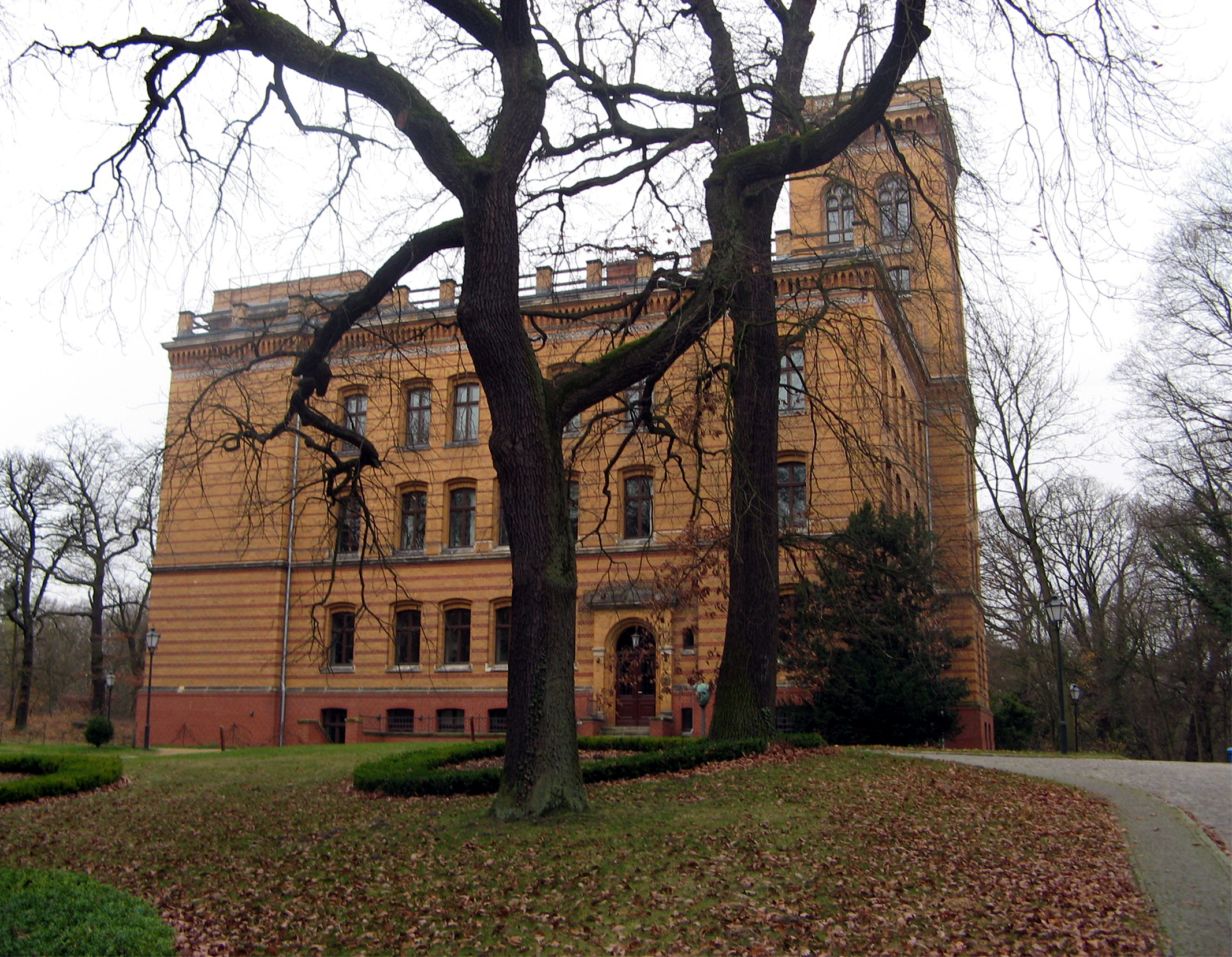 Im 1890–1893 errichteten Königlichen Meteorologischen Observatorium arbeitete der Geophysiker Adolf Schmidt als Vorsteher des Magnetischen Observatoriums des Meteorologischen Instituts in Potsdam ab 1902, als Vorsteher des Meteorologisch-Magnetischen Observatoriums Potsdam ab 1909 und als sein Direktor ab 1927 bis zu seiner Pensonierung 1928. Heute ist es das Süring-Haus im Wissenschaftspark "Albert Einstein", das seit 2007 gemeinsam vom Potsdam-Institut für Klimafolgenforschung (PIK) und dem Deutschen Wetterdienst (DWD) genutzt wird.